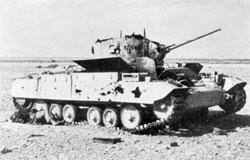 BIR EL GOBI (LIBIA) 5 DICEMBRE 1941 LA M.O.V.M IPPOLITO NICCOLINI VICINO AL CARRO ARMATO INGLESE FERMATO COL SACRIFICIO DELLA SUA VITA